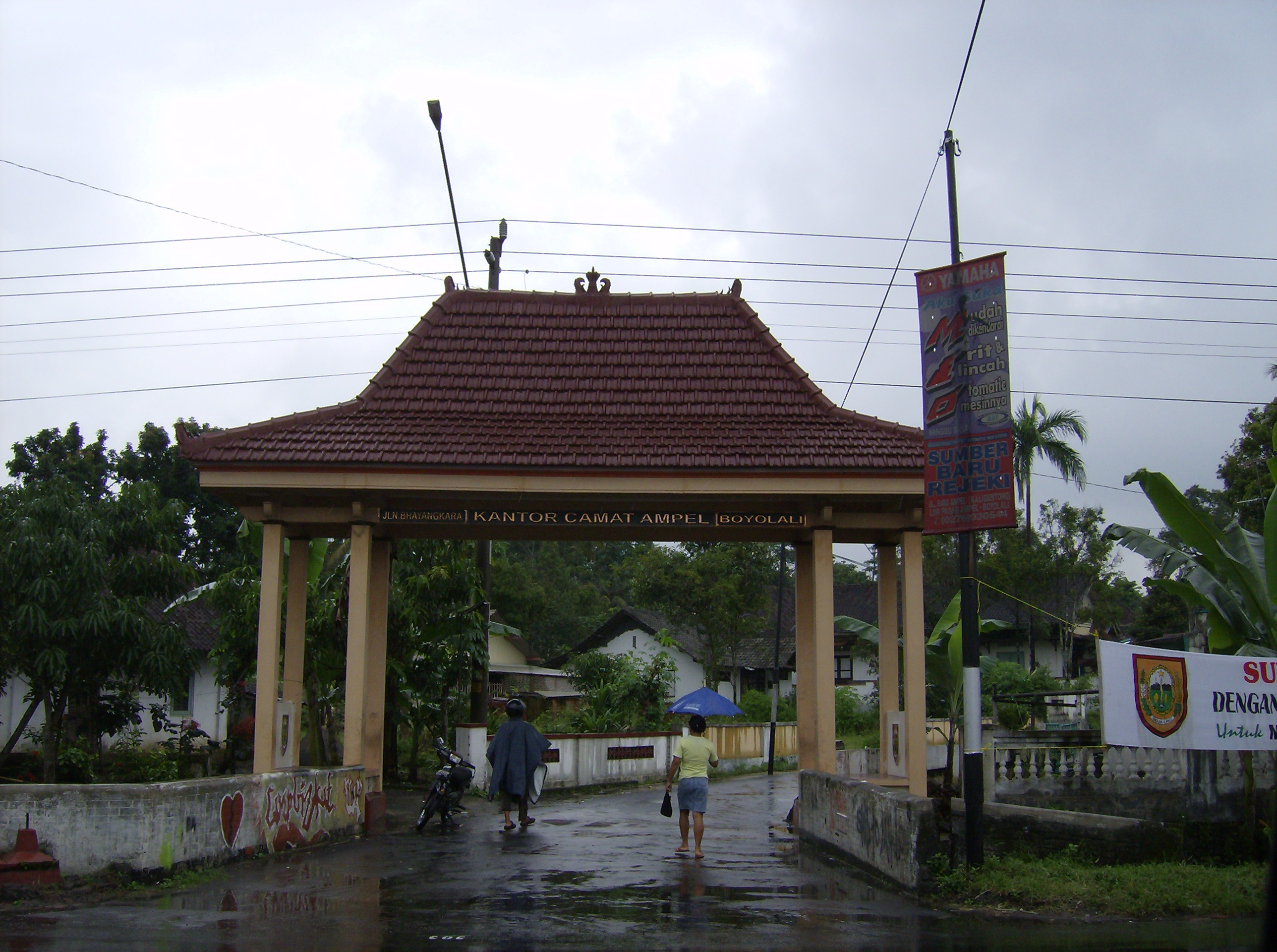 Made by Meursault2004 aka Revo Arka Giri Soekatno